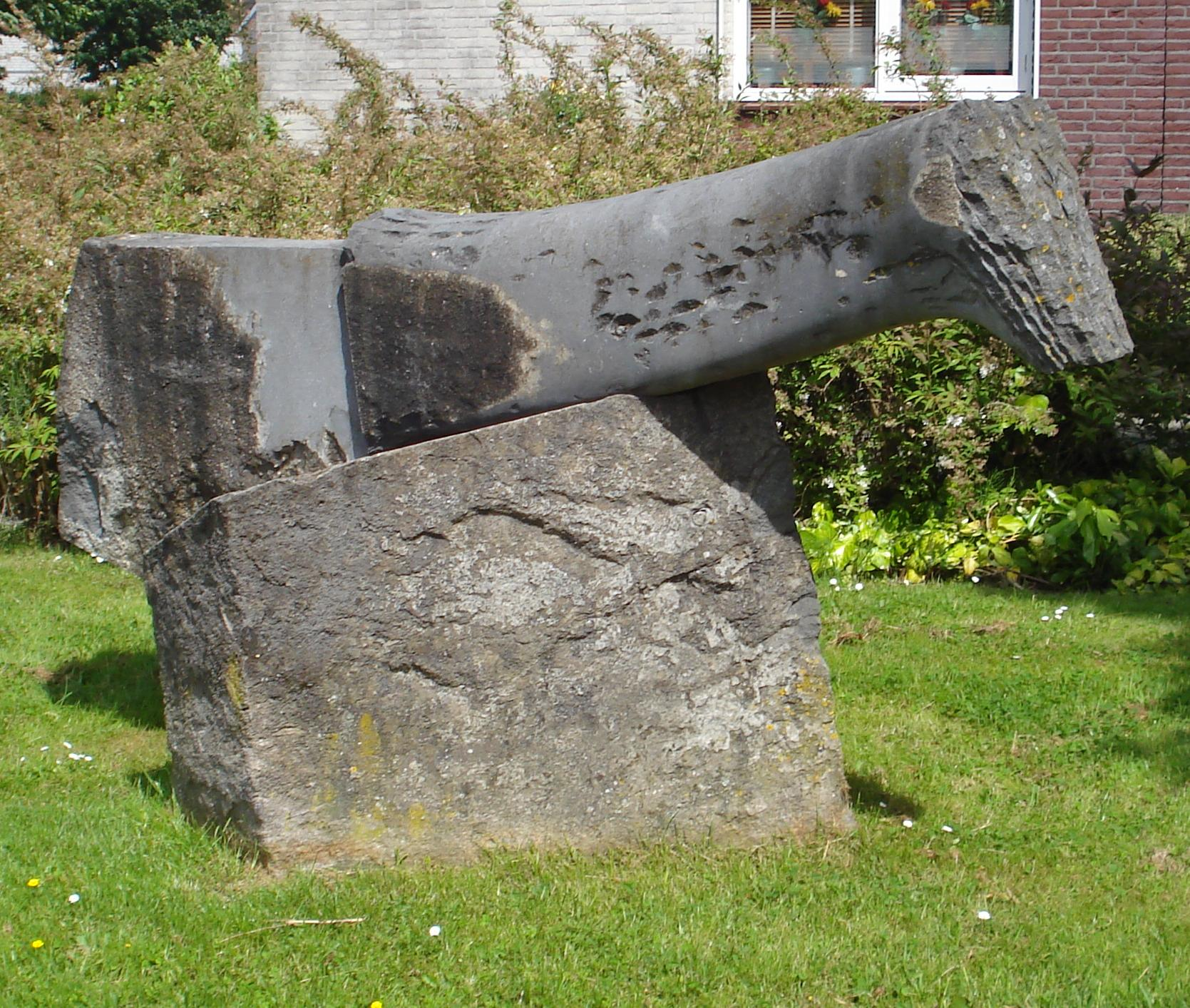 Sliedrecht, Thorbeckelaan/ Hopper. Kunstwerk "Divina commedia" van Doorlie Gerdes. The Netherlands. The photographical reproduction of this work is covered under the article 18 of the Dutch copyright law, which states that “it is not an infringement of copyright to reproduce and publish pictures of a work, as meant in article 10, first paragraph, under 6°[1] or of an architectural work as meant in article 10, first paragraph, under 8°[2], which are made to be permanently located in a public place, as long as the work is depicted as it is located in the public space. Where incorporation of a work in a compilation is concerned, not more than a few of the works of the same author may be included”. [1] drawings, paintings, works of architecture and sculpture, lithographs, engravings and the likes [2] drafts, sketches and three-dimensional works relating to architecture, geography, topography or other sciences Note that photographs are not included in Item 6. They are separately listed at Item 9 and are therefore not covered by FOP. See COM:CRT/Netherlands#Freedom of panorama for more information. .